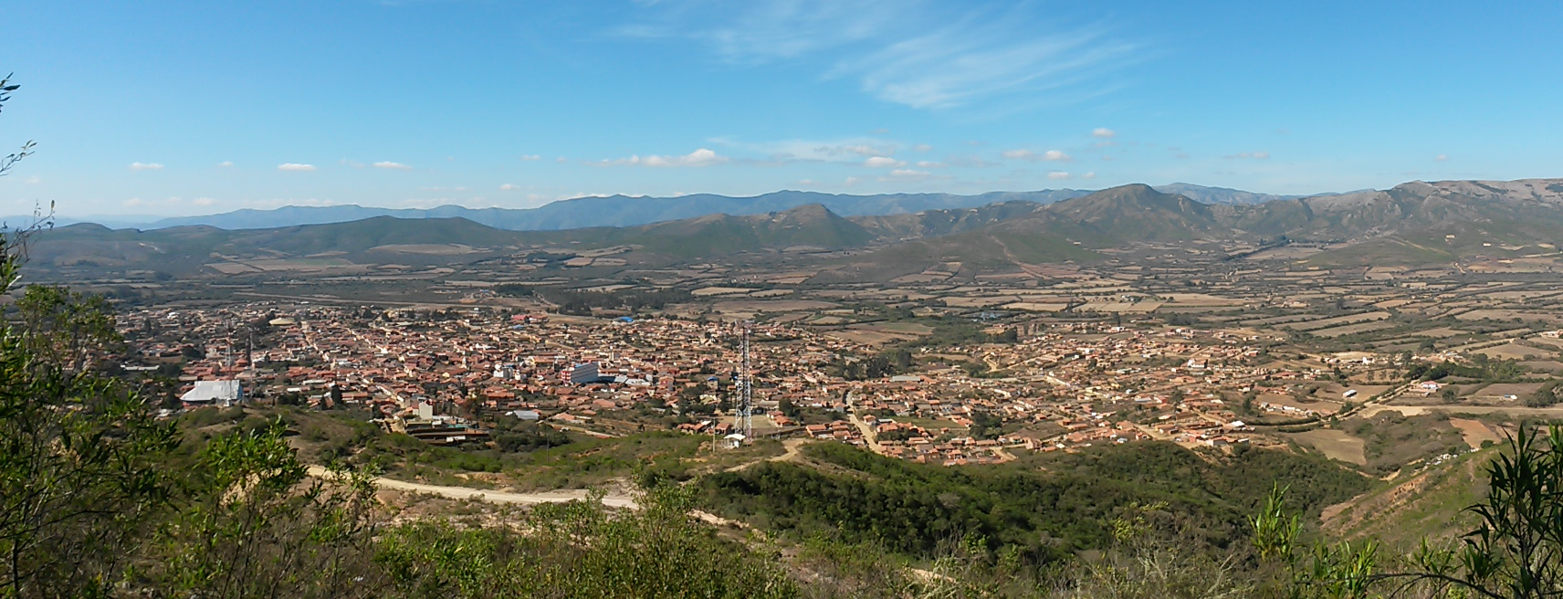 fotografia panoramica de vallegrande